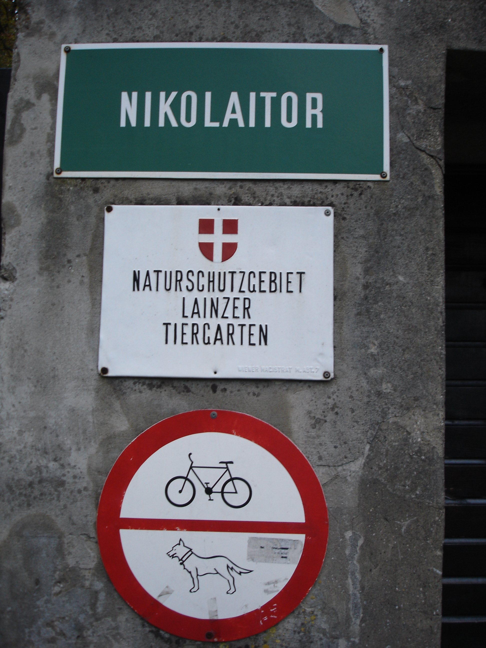 Nikolaitor (Nikolai Gate) of Vienna's Lainzer Tiergarten